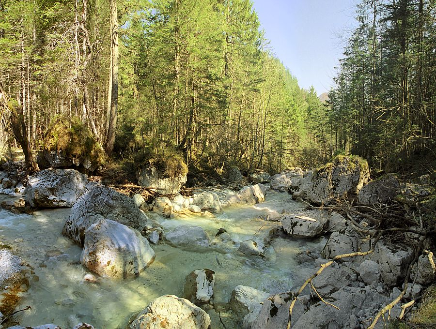 Ramsauer Ache im Zauberwald im Berchtesgadener Land